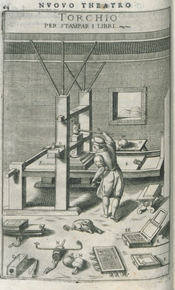 Torchio tipografico tratto da Novo teatro di machine et edificii